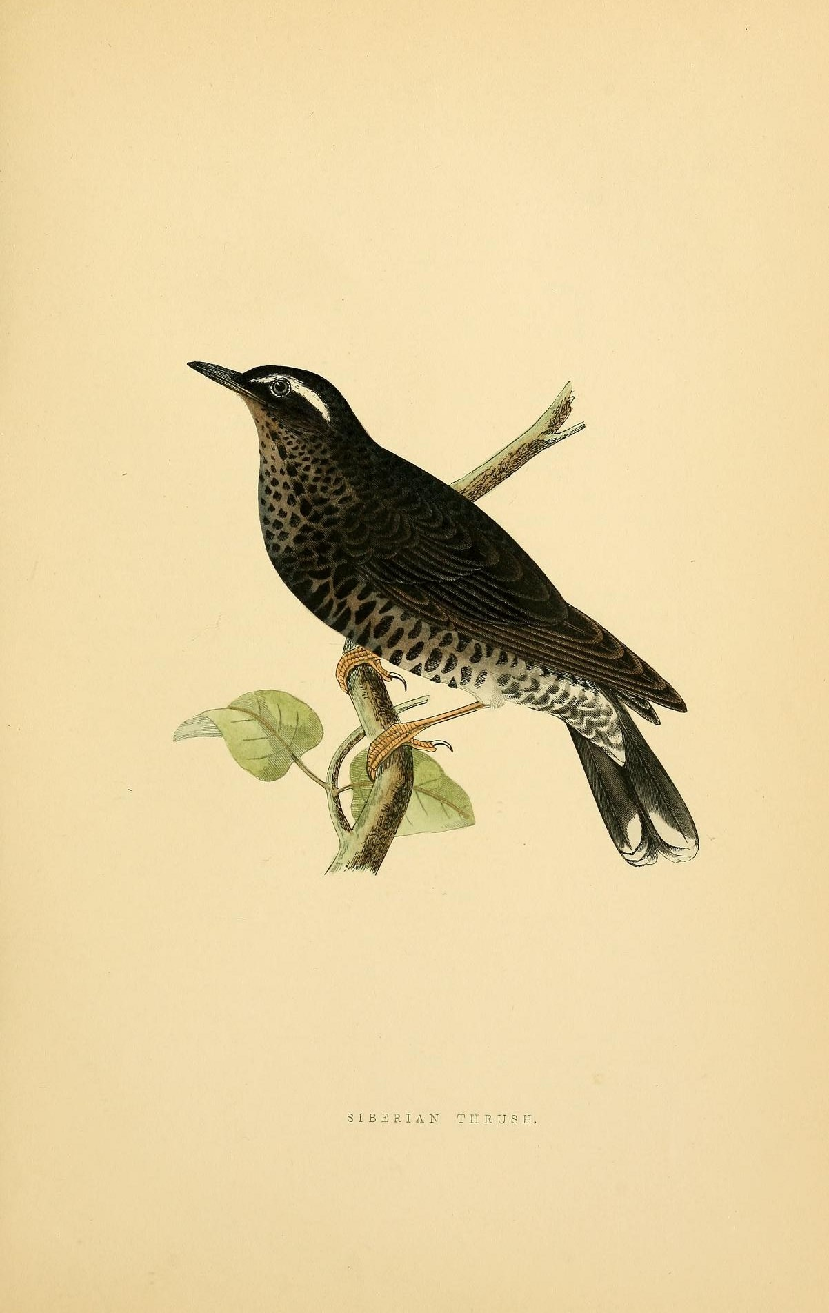 SIBERIAN THRUSH.